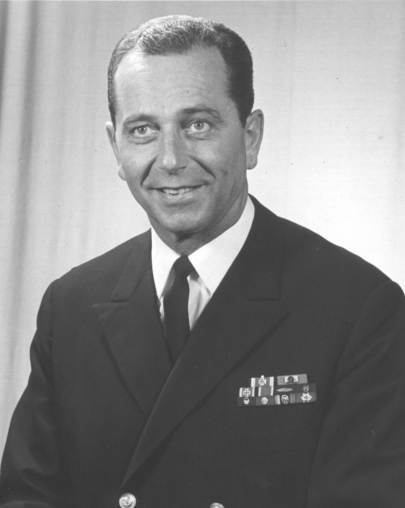 Porträtfotografie von Flottillenadmiral Bernd Klug